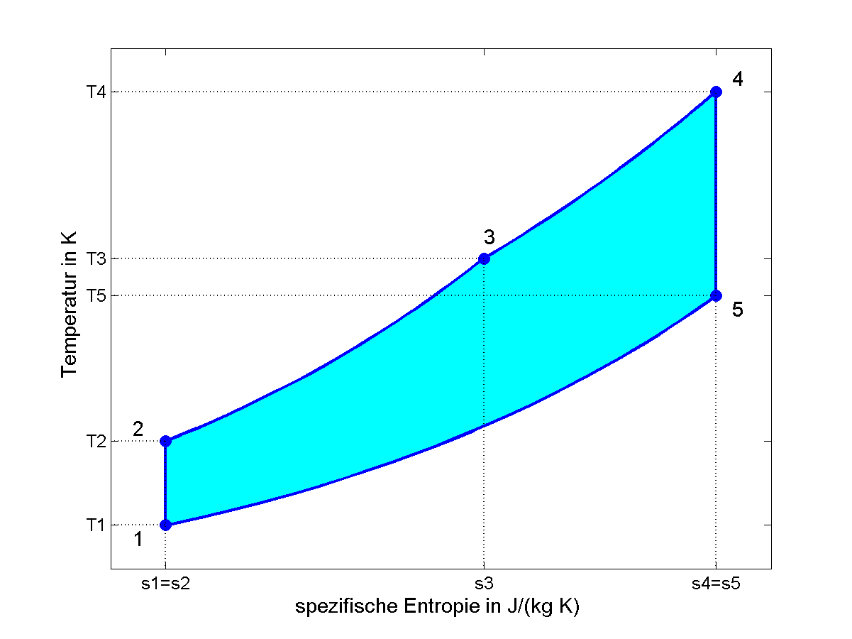 Ts-Diagramm Seilinger-Prozess